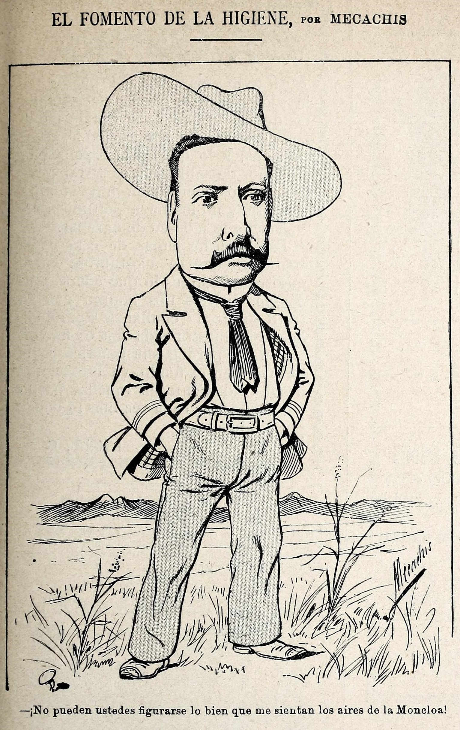 El fomento de la higiene